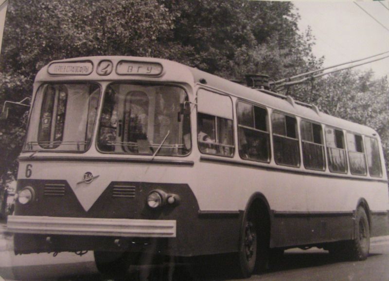 Первые троллейбусы ЗиУ-5 в Воронеже